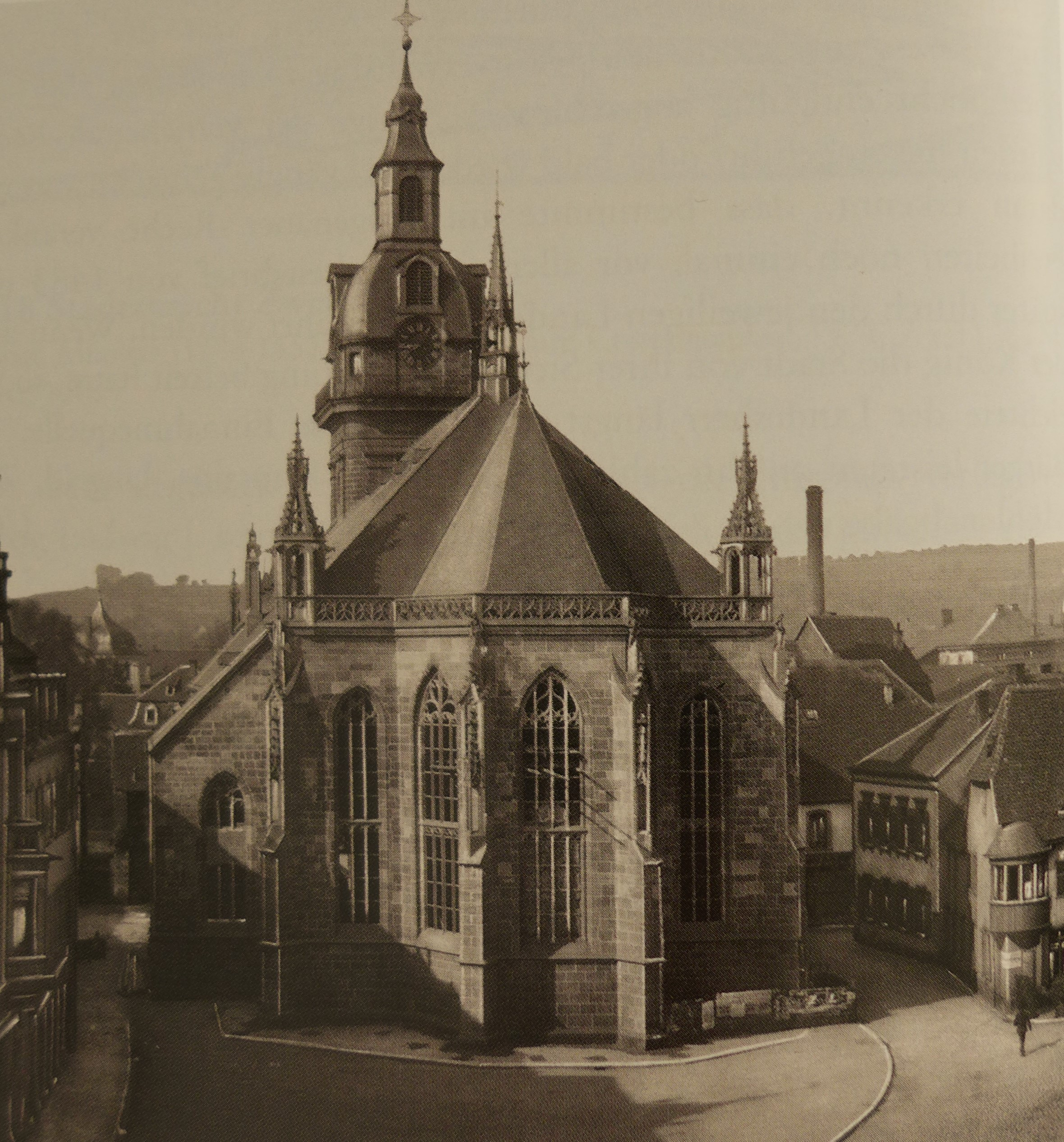 Alexanderkirche (Zweibrücken), Apsisbereich vor der Zerstörung vom 14. März 1945